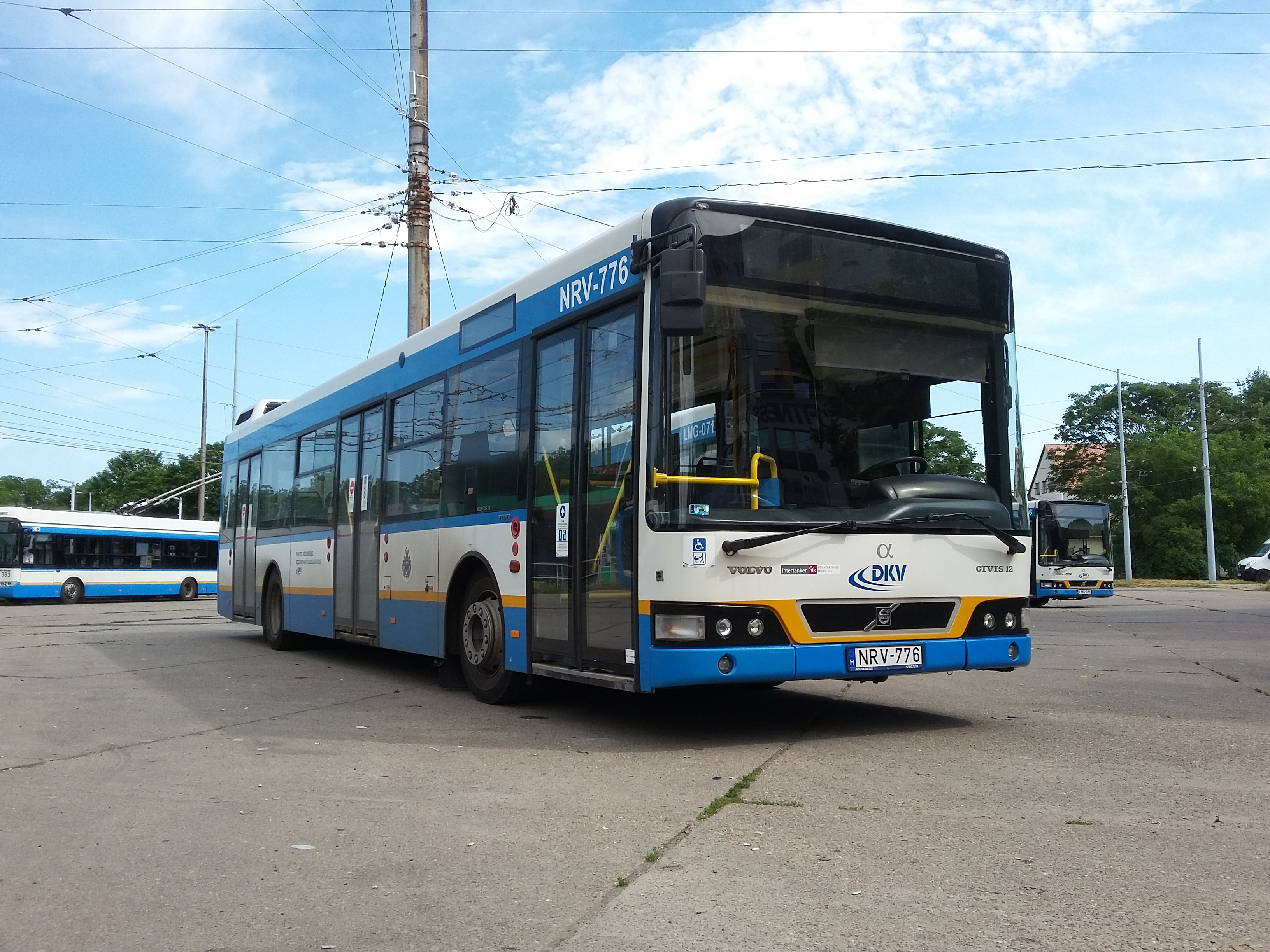 Cívis 12 típusú busz a Segner téren